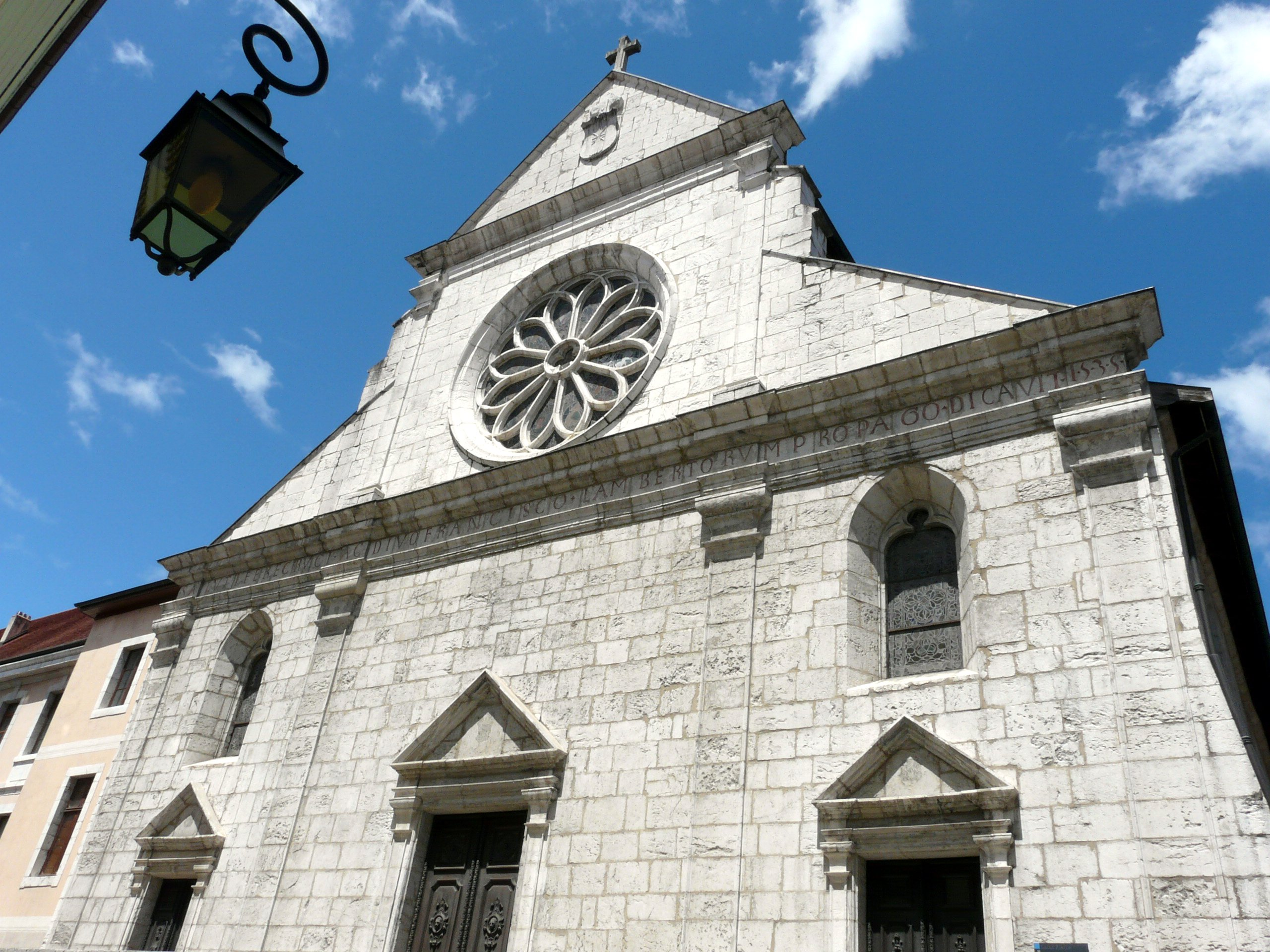 Façade de la cathédrale Saint-Pierre d'Annecy juillet 2008 Emmanuel BRUNNER (manu25)